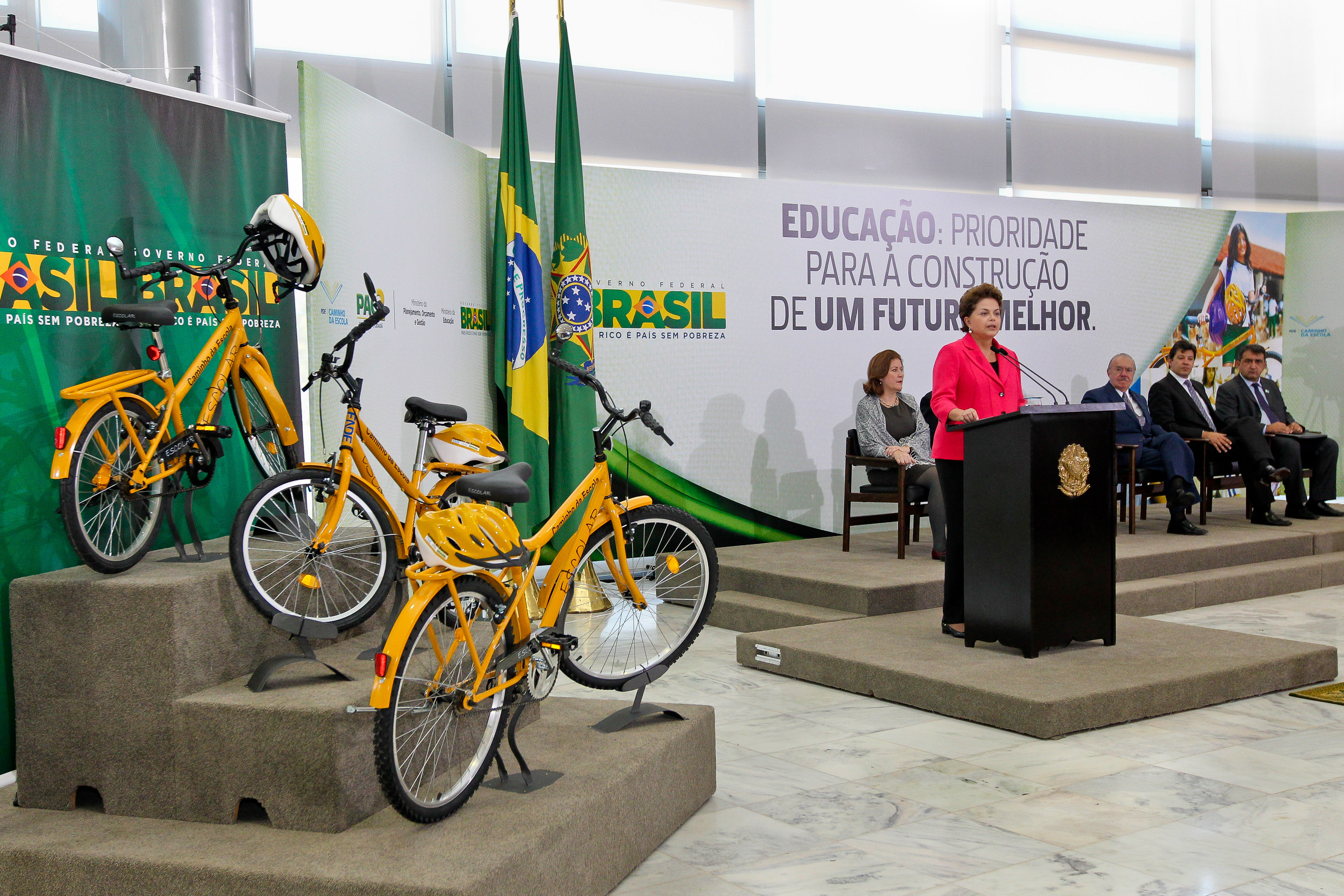 Brasília - DF, 26/05/2011. Presidenta Dilma Rousseff participa da Cerimônia de assinatura de termos de compromisso para construção de quadras esportivas escolares cobertas e unidades de educação infantil do PAC 2 e doação de bicicletas e capacetes escolares do programa Caminho da Escola. Foto: Roberto Stuckert Filho/PR.